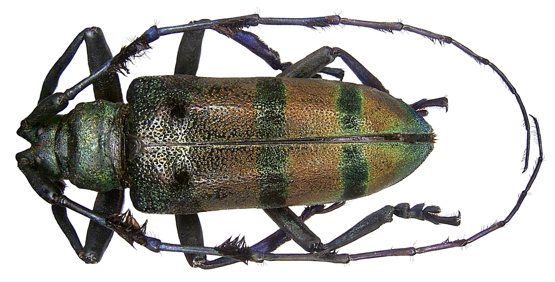 Familie: Cerambycidae Groesse: 38 mm Fundort: Indonesien, Sumatra, 2006 det. A.Weigel, 2007 Photo: U.Schmidt, 2008